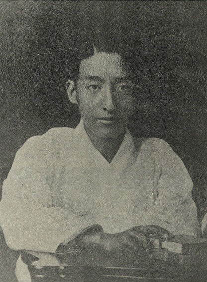 朴載赫박재혁